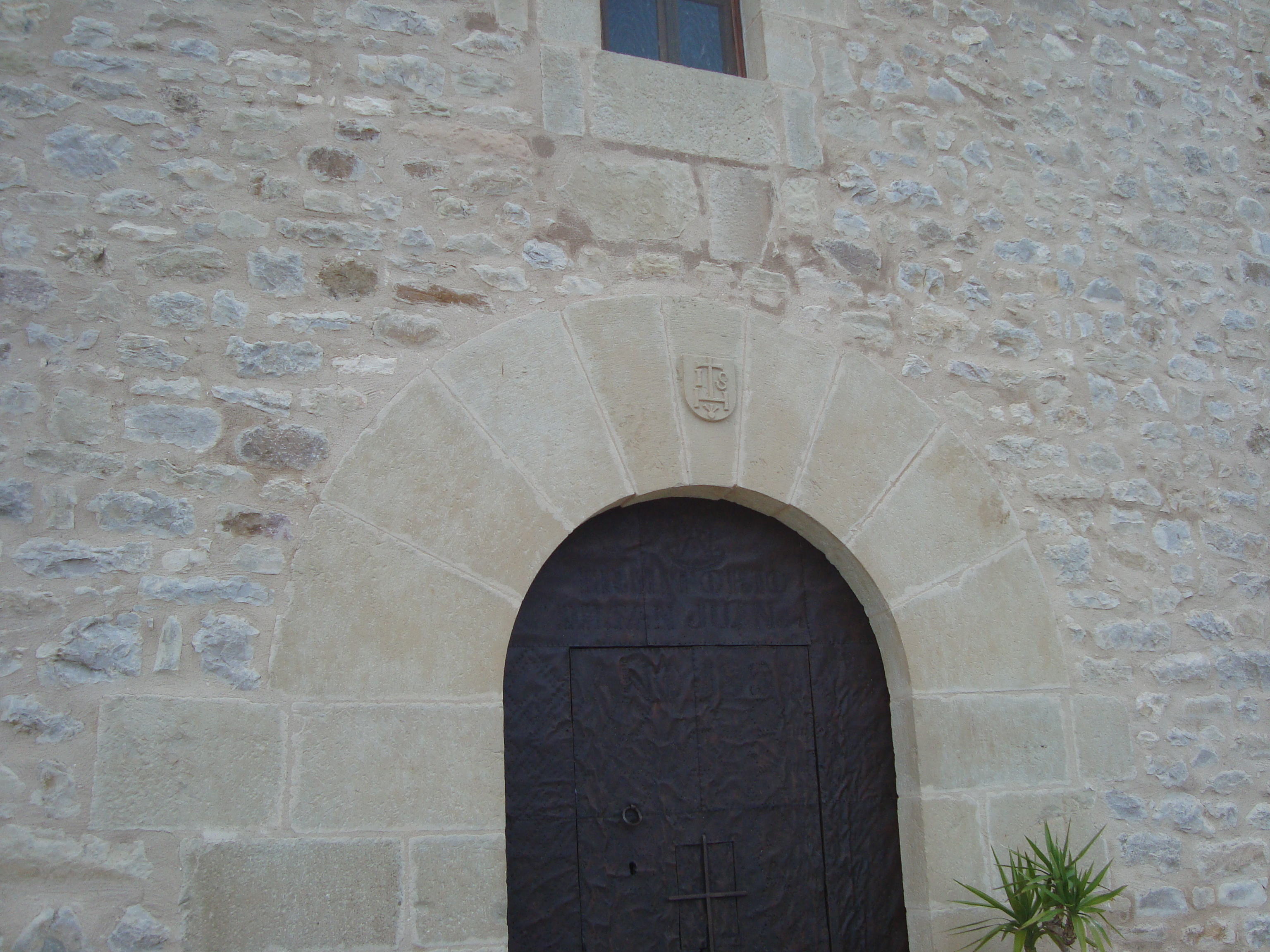 Ermita de Sant Joan del Castell (Atzeneta del Maestrat) 04.001-004.